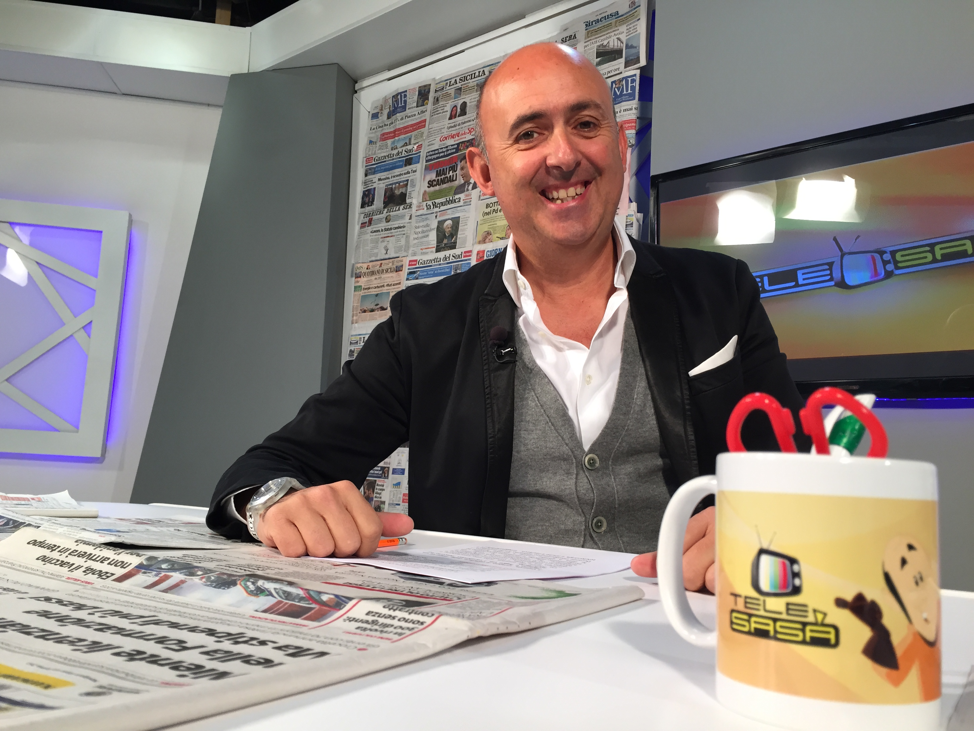 Tele Sasà